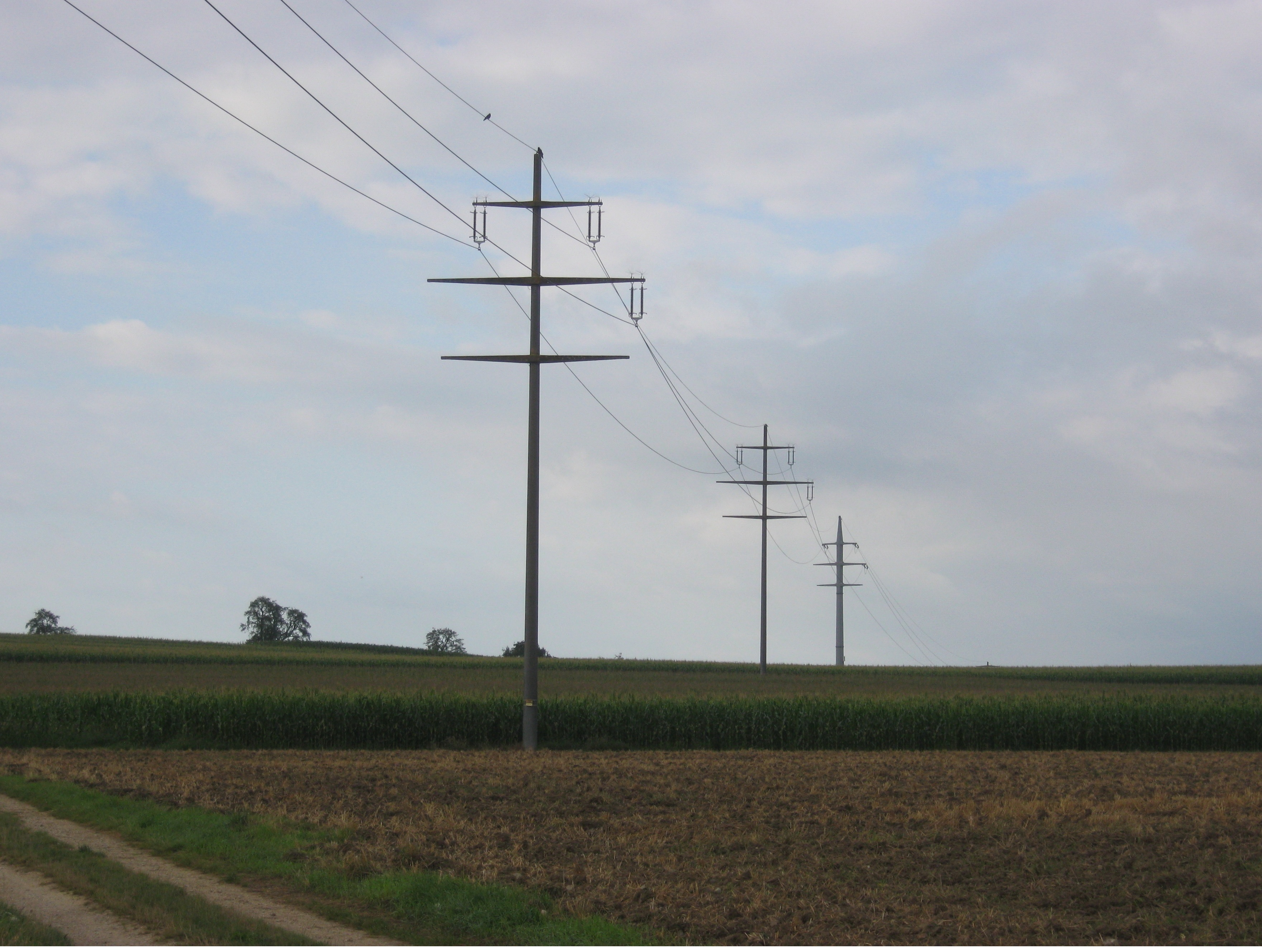 Hochspannungsleitung der EKS nördlich von Bietingen, Landkreis Konstanz